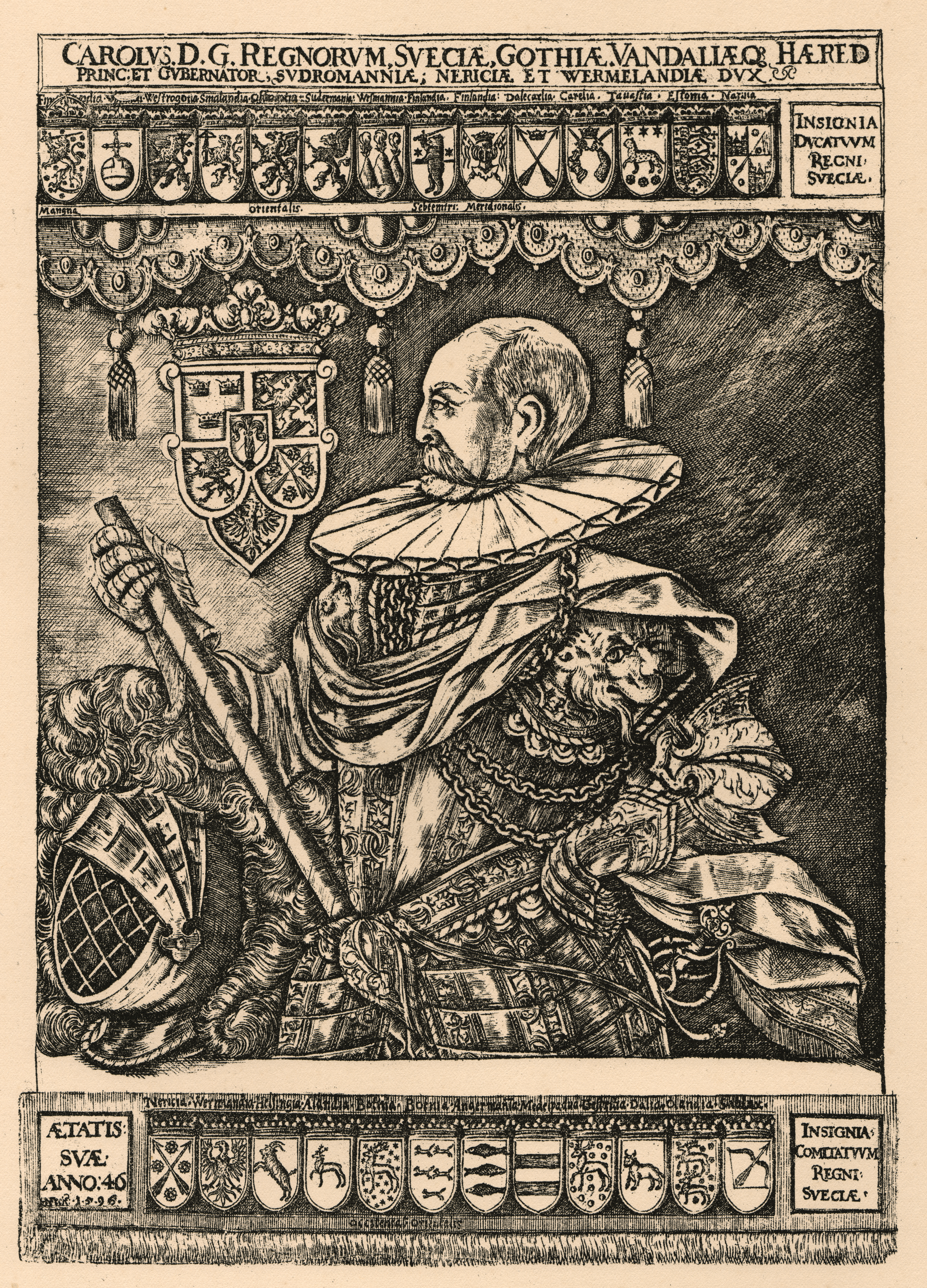 Karl IX. Kända samtida, i koppar stuckna porträtt af Carl IX äro egentligen endast två. Originalet till detta kopparstick är graveradt af Hieronymus Nützel från Glauchau, densamme som utfört antaflan, och är signeradt af honom 1596. Att de här återgifna dragen helt visst hafva mycket likhet med den sträfve hertigen lider intet tvifvel; också har denna bild tagits till typ för de flesta senare afbildningar af Carl IX. Nützels gravyr är dock ingalunda något mästerverk, men har ett obestridligt värde, dels genom sin sällsynthet, dels genom den efter all anledning stora likheten med originalet. Bildens öfre och undre sidor prydas, utom af diverse inskriptioner, af de dåvarande 14 hertigdömenas och de 12 grefskapens vapen. Framför hertigens hufvud, i bakgrunden synes det af Carl förda vapnet, företeende en ur heraldisk synpunkt rätt intressant sammanställning af riksvapnet, vasavapnet samt Södermanlands, Nerikes och Vermlands vapen.